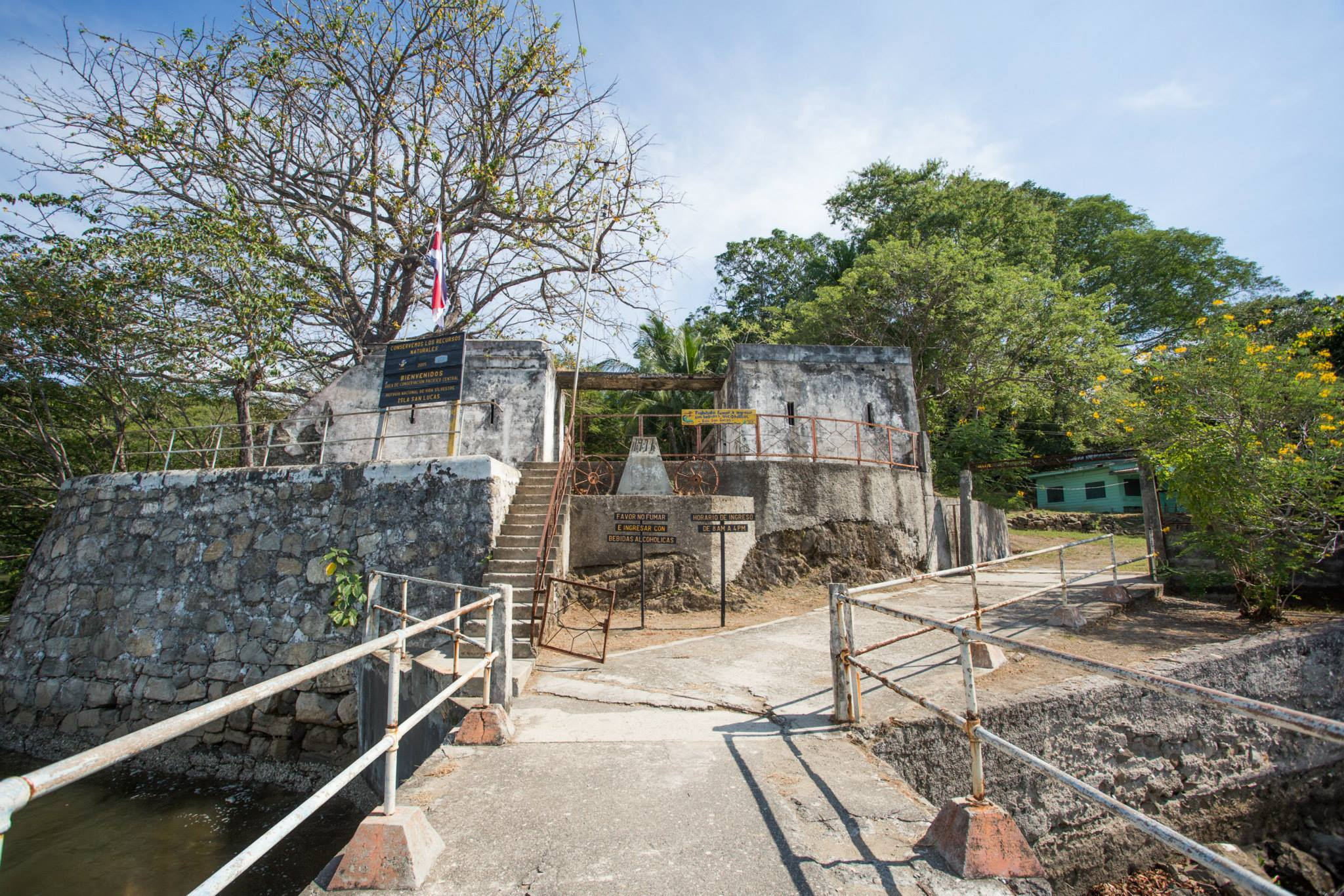 Muelle principal de la isla San Lucas. Puntarenas, Costa Rica.